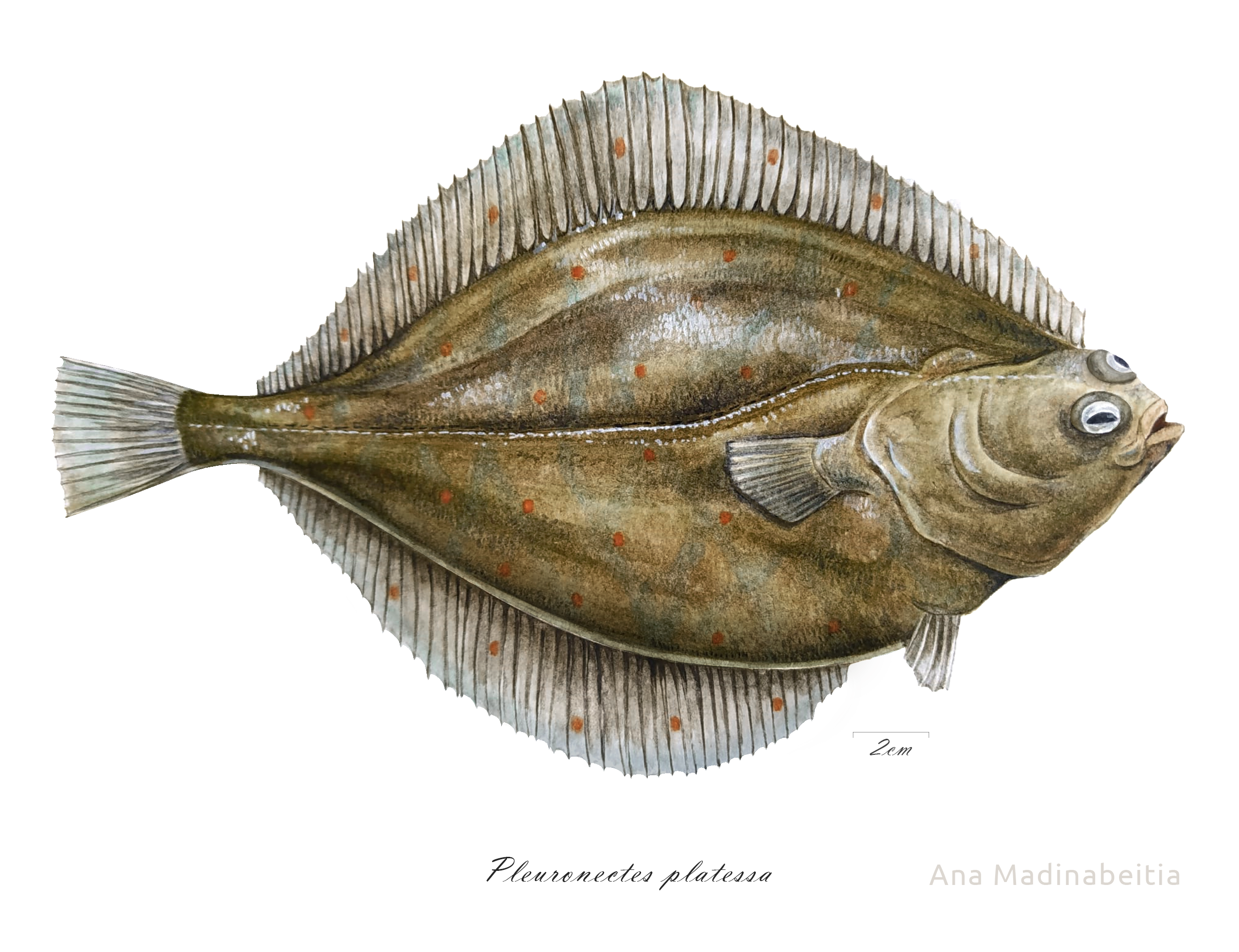 Pleuronectes platessa, akuarela paperean. Ana Madinabeitia, Norarte studio.